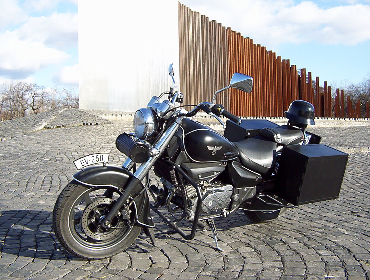 Hyosung GV250 Aquila